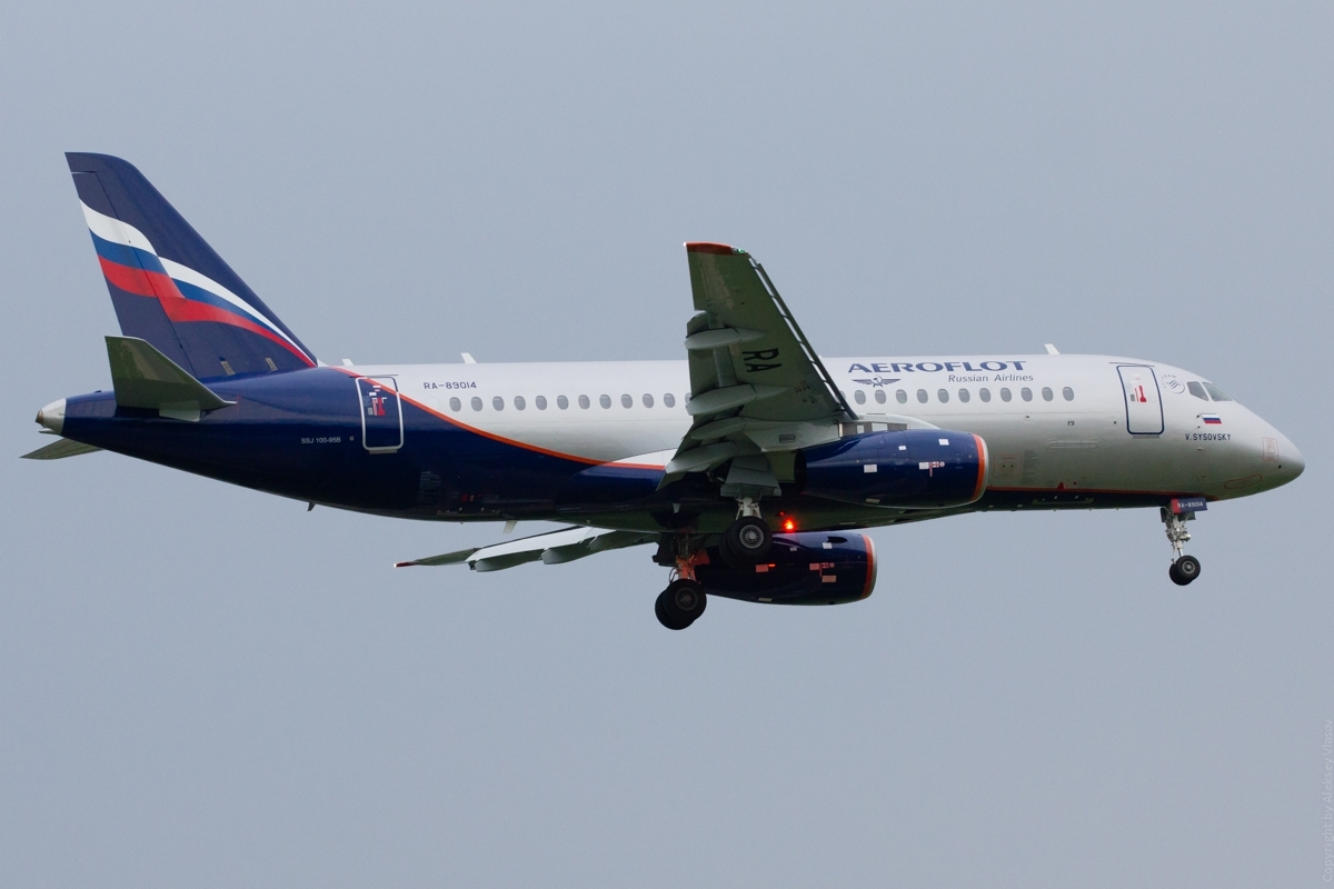 Sukhoi Superjet 100-95 (RA-89014)